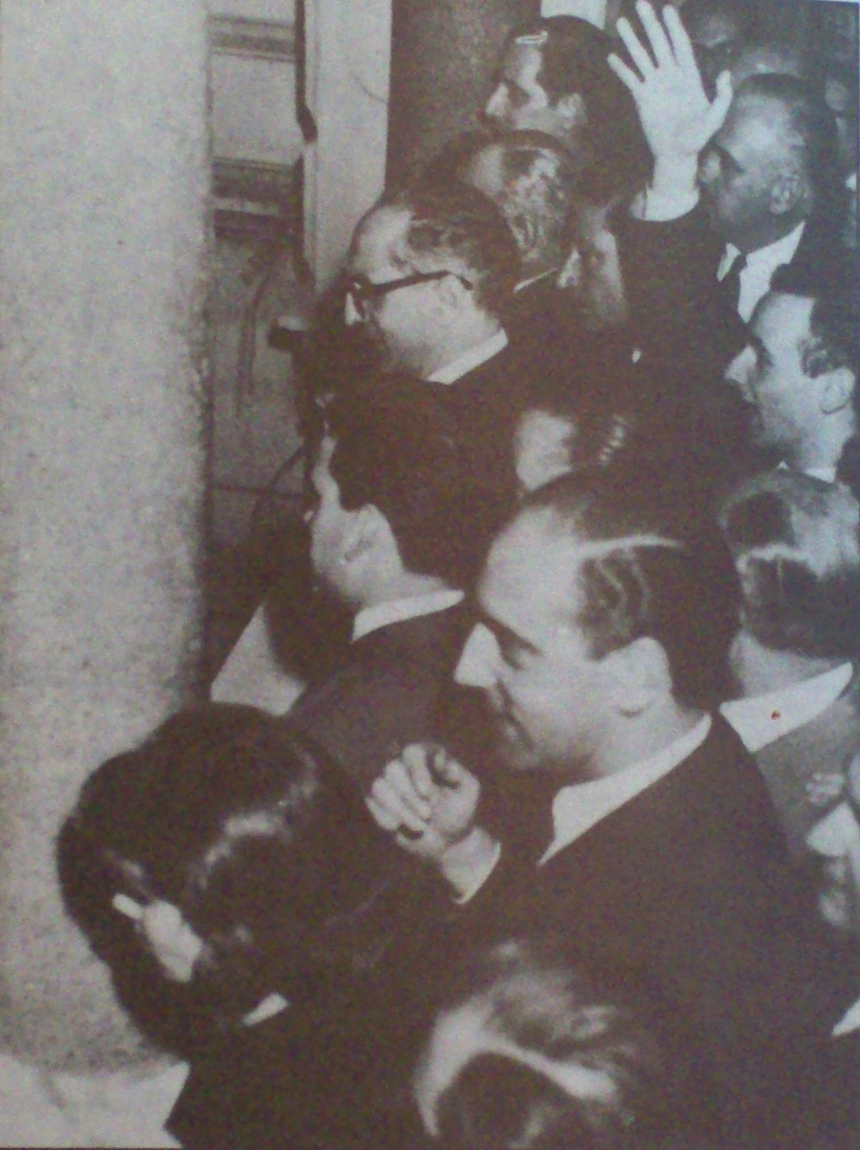 El presidente argentino del momento Arturo Frondizi (el pelado de anteojos), observa desde el balcon de la casa rosada a las protestas estudiantiles, con sus eslogans "Laica o libre".